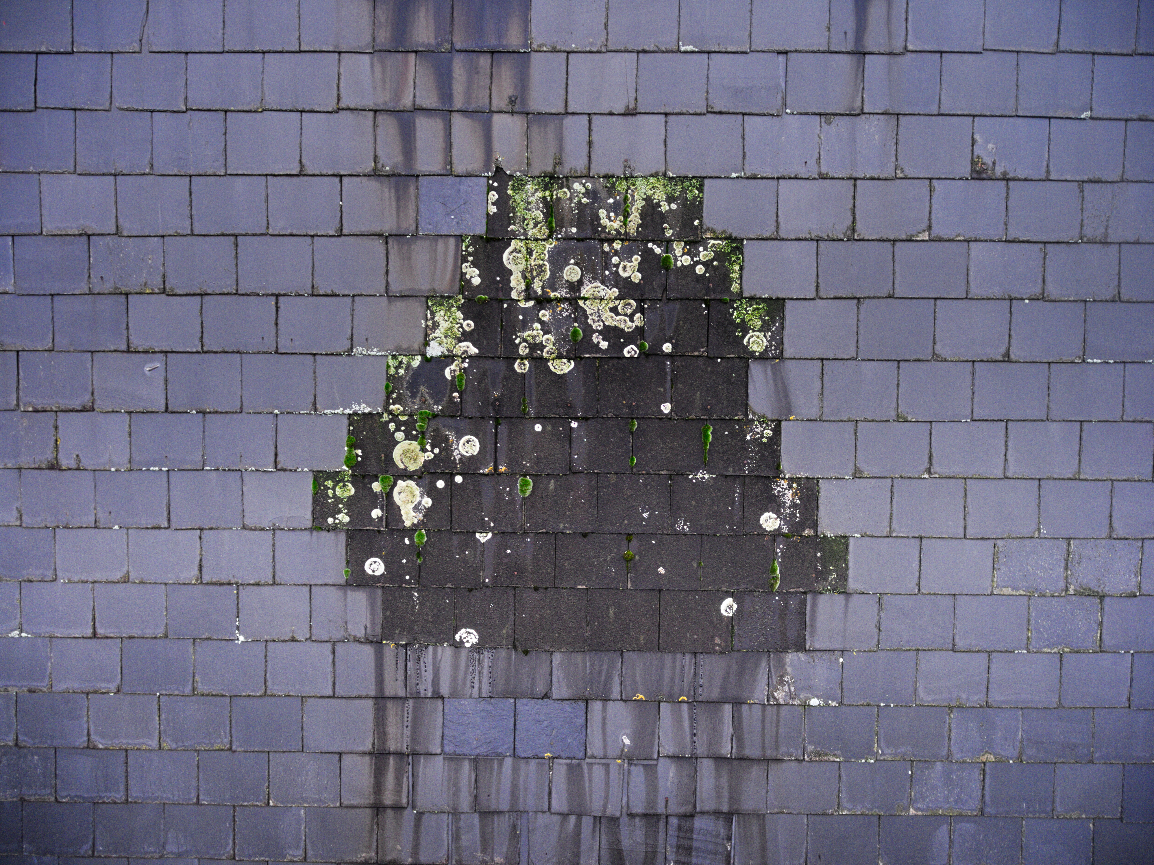 Grünbelag auf einem Dach. Laut Aussage der Eigentümer wurde wohl in grob in den 1950er Jahren das Dach um einige kleine Türme/Fenster etc. erleichtert und anderes Material aus kostengründen verwendet. Es ist ein deutlicher Unterschied der Materialien im Bezug auf Grünbelag zu erkennen.